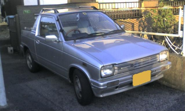 Suzuki Mighty Boy